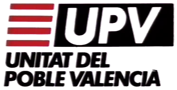 Combinació d'imatges planes, bàsiques i genèriques que intenten representar el logo de la UPV